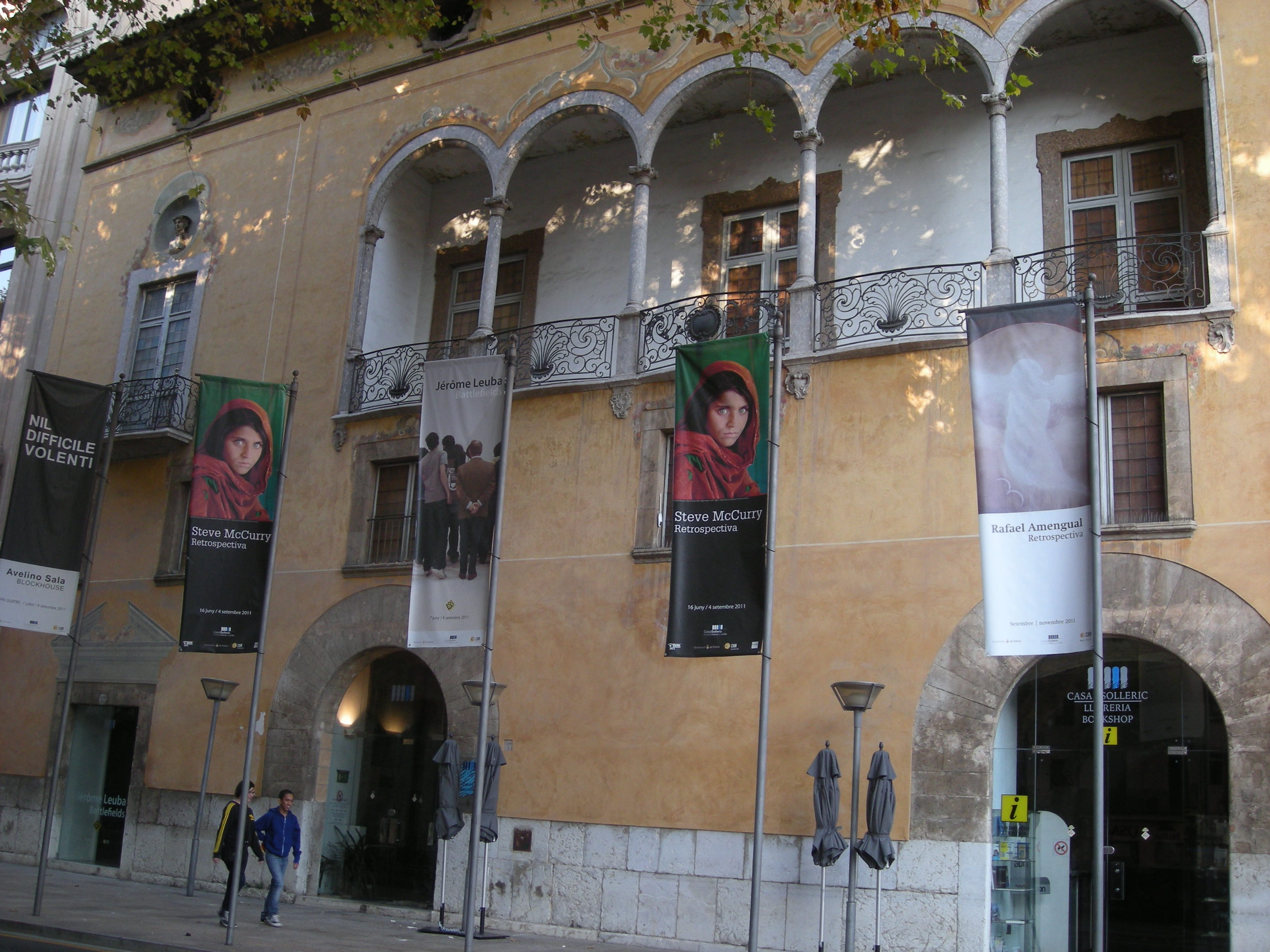 Palau Solleric. Passeig del Born, 25. Palma. Mallorca